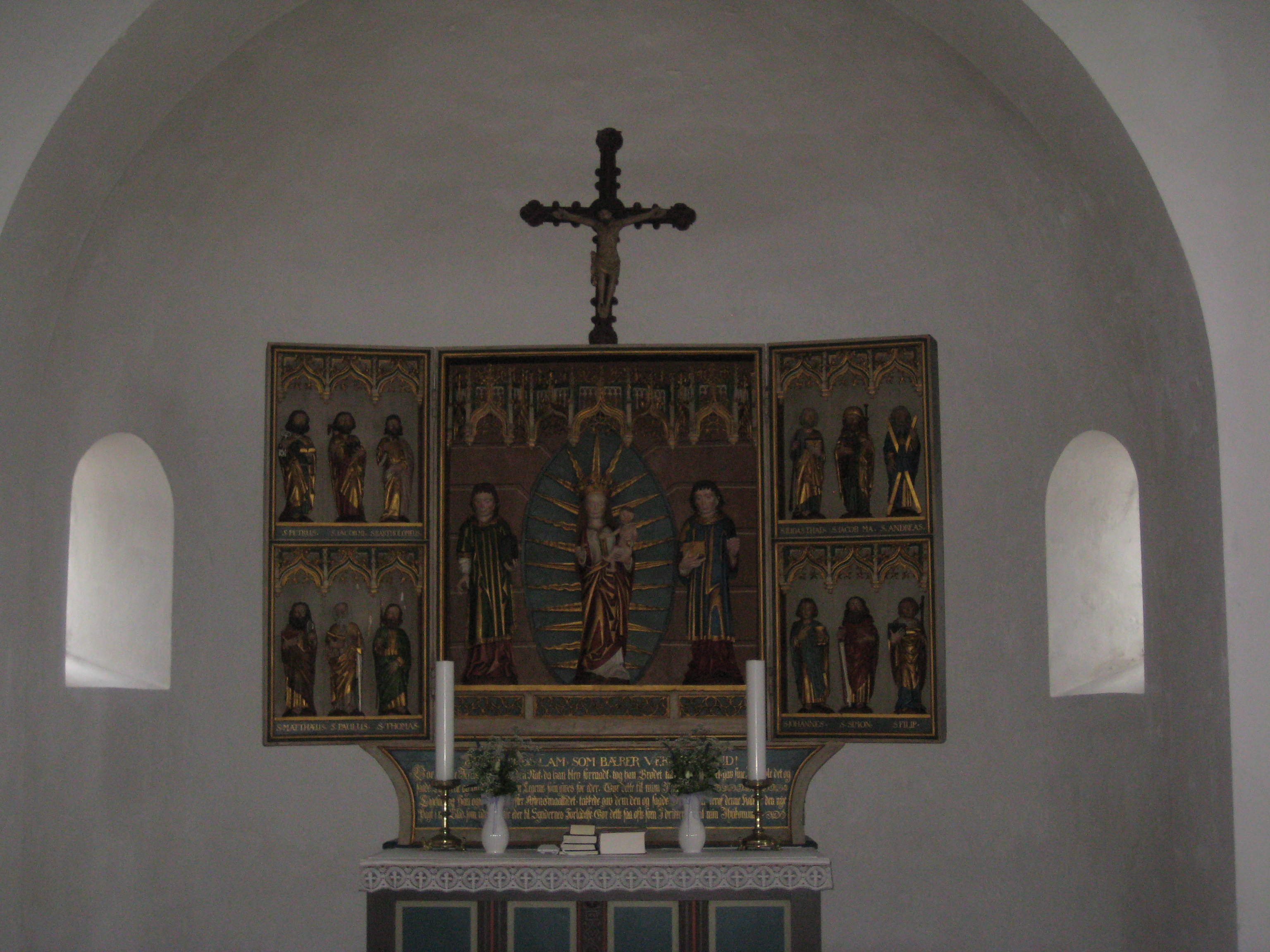 Altertavle i Jernvedkirke (Esbjerg Kommune)